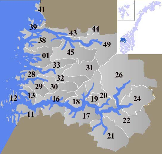 Sogn og Fjordane Fylke has 26 Municipalitys,Put 14 in front of the nr on the map and you have the official nr of that Municipality. Sogn og Fjordane Fylke har 26 kommuner. 14 foran nr på kartet gir det offesielle kommunenr.(td har den sørlegste kommunen Aurland nr 1421).(14 er Sogn og Fjordane Fylke sitt nr)